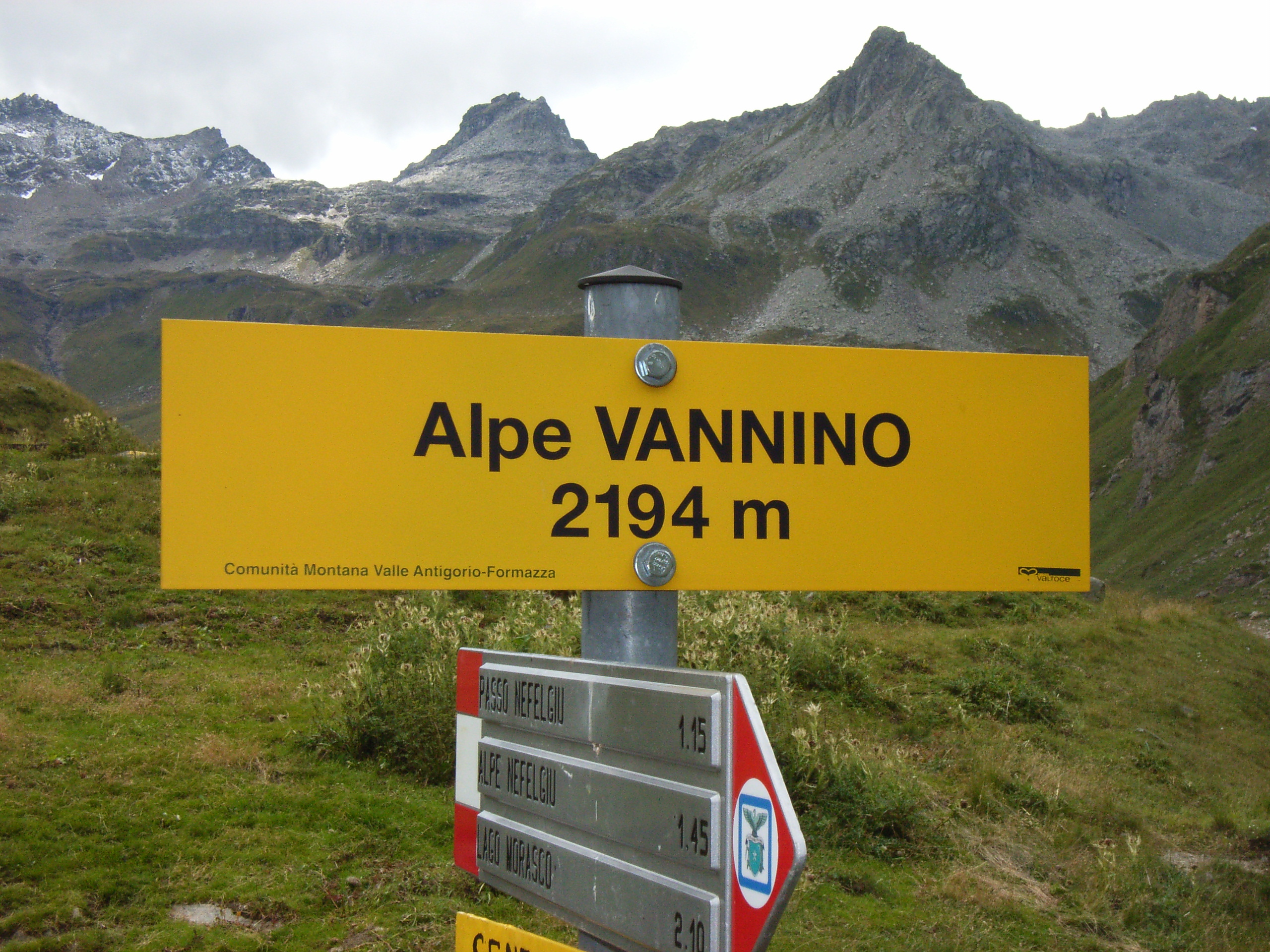 immagine scattata da me in montagna